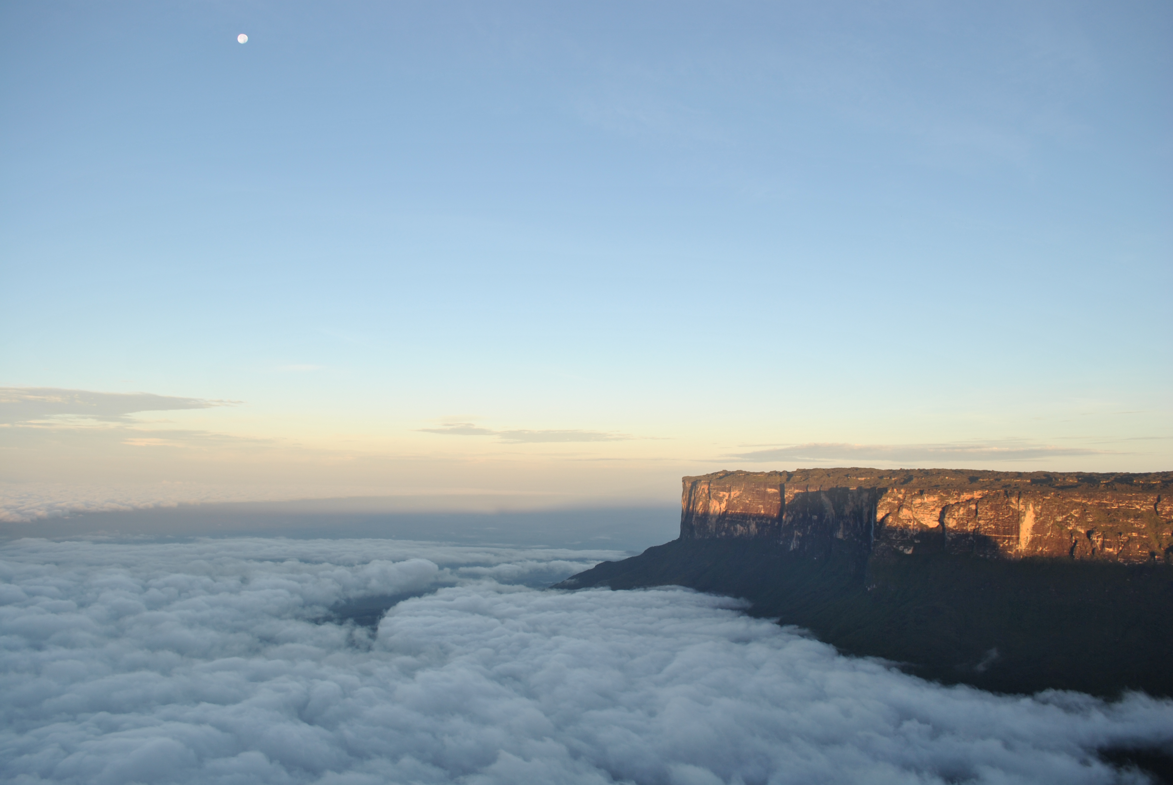 Tomada desde la cumbre del Tepui Roraima